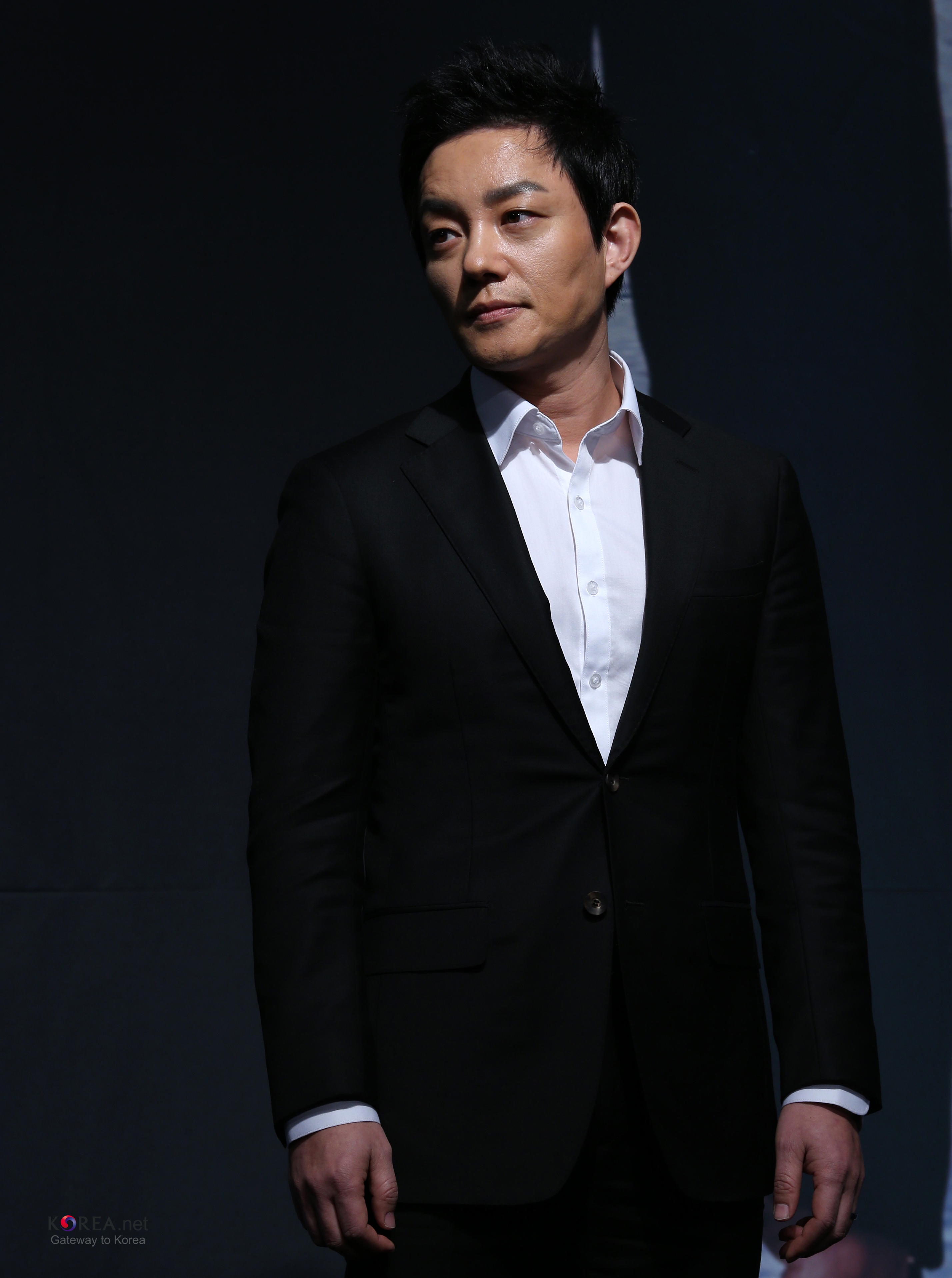 K-Drama 'IRIS 2' Press Conference Lee Bum-soo Lotte Hotel, Seoul 2013.02.07. Ministry of Culture, Sports and Tourism Korean Culture and Information Service Jeon Han Articles about IRIS2 Korean blockbuster drama Iris returns (日本語) 韓国ドラマ、2013年のキーワードは“アクション” ブロックバスタードラマ「アイリス(IRIS)２」、いよいよ放映 (中文) 2013年韩剧的关键词为“动作” 风靡一时的韩剧《IRIS》将重返荧幕 (Vietnamese) Phim truyền hình hành động lên ngôi năm 2013 Phần 2 của phim truyền hình bom tấn 드라마 아이리스2 제작발표회 북한 테러리스트 유중원 역할을 맡은 이범수 롯데호텔, 서울 문화체육관광부 해외문화홍보원 코리아넷 전한